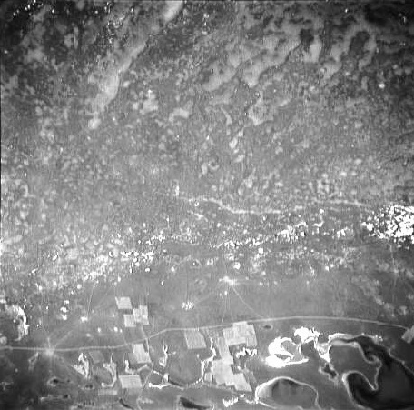 Ryn Desert